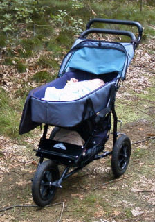 All-terrain kinderwagen met afneembare reiswieg. Het onderstel kan, met speciaal accessoir, ook als wandelwagen gebruikt worden.